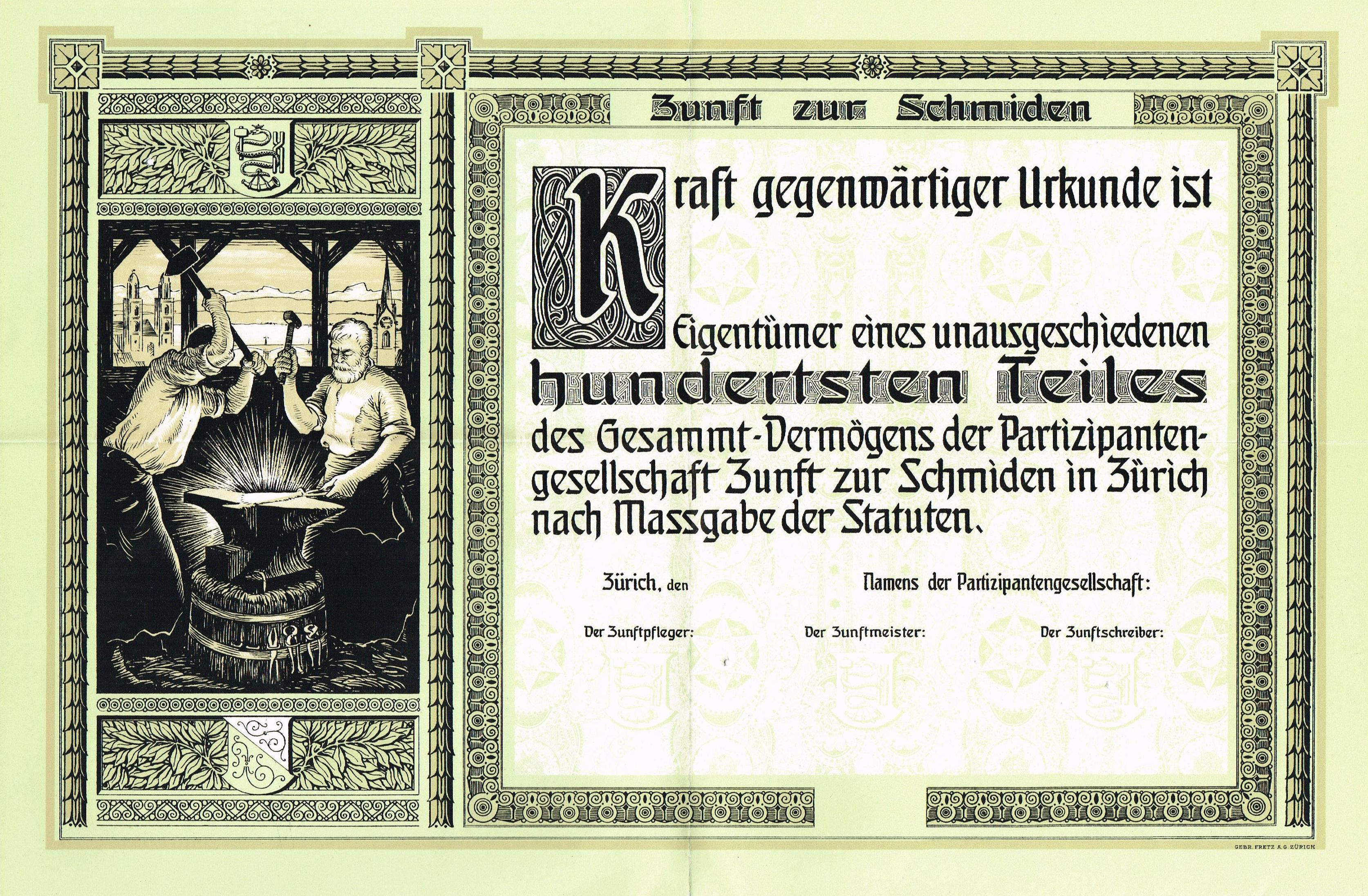 Blankette eines Partizipationsschein der Zunft zur Schmiden vom Anfang des 20. Jahrhunderts